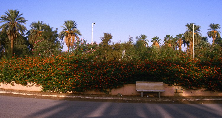 El Golea, die gepflegte Stadt in der algerischen Sahara